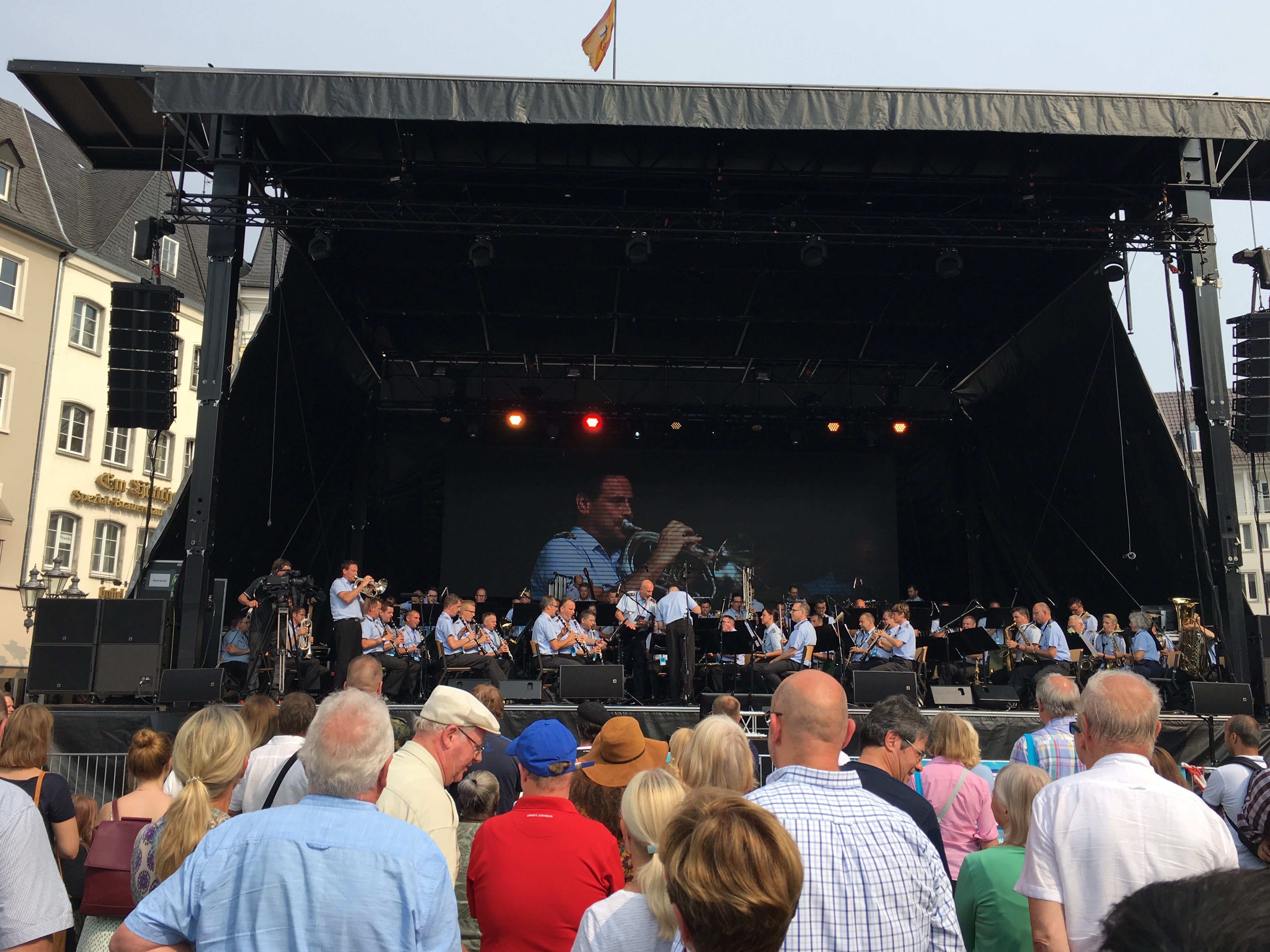 Konzert des Musikkorps der deutschen Bundeswehr am „Tag der Bundeswehr“ ; aufgenommen auf dem Bonner Markt.